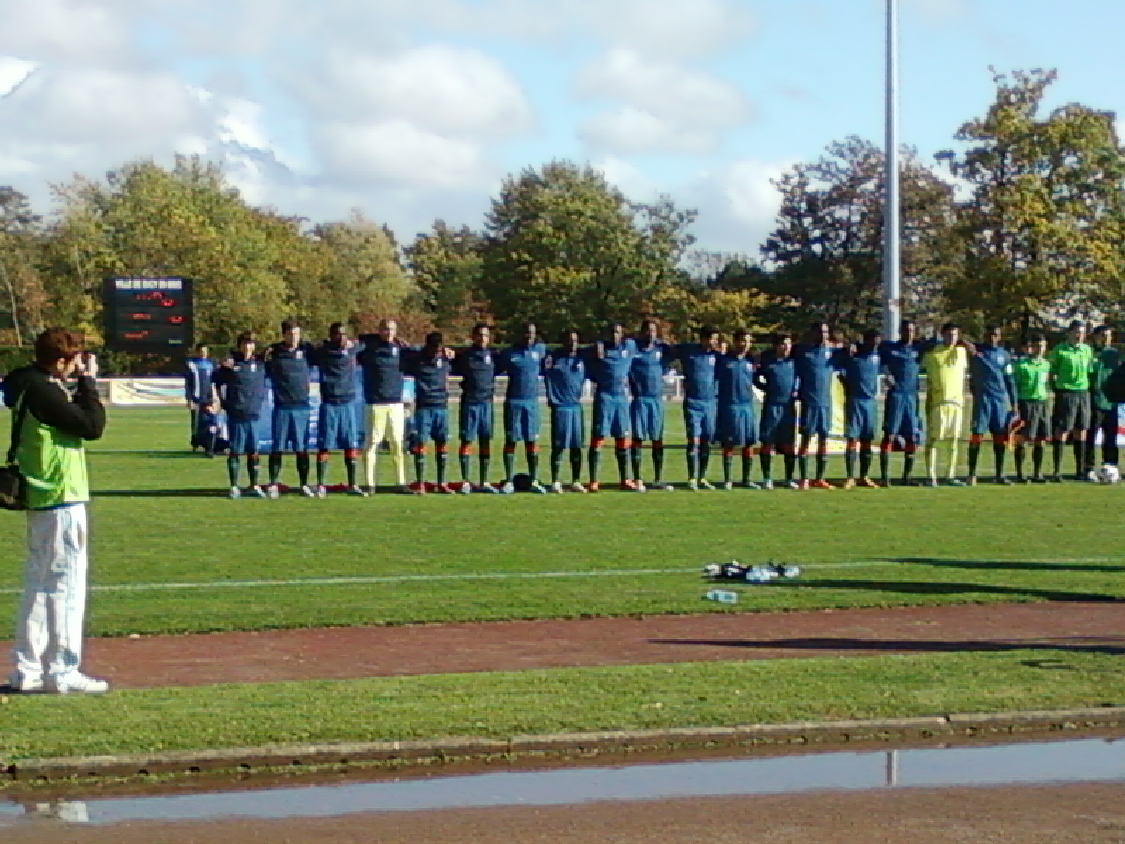 L'équipe de France U16 lors du match contre les USA du 25 octobre 2011 à Sucy-en-Brie (1ère journée du tournoi du Val-de-Marne)